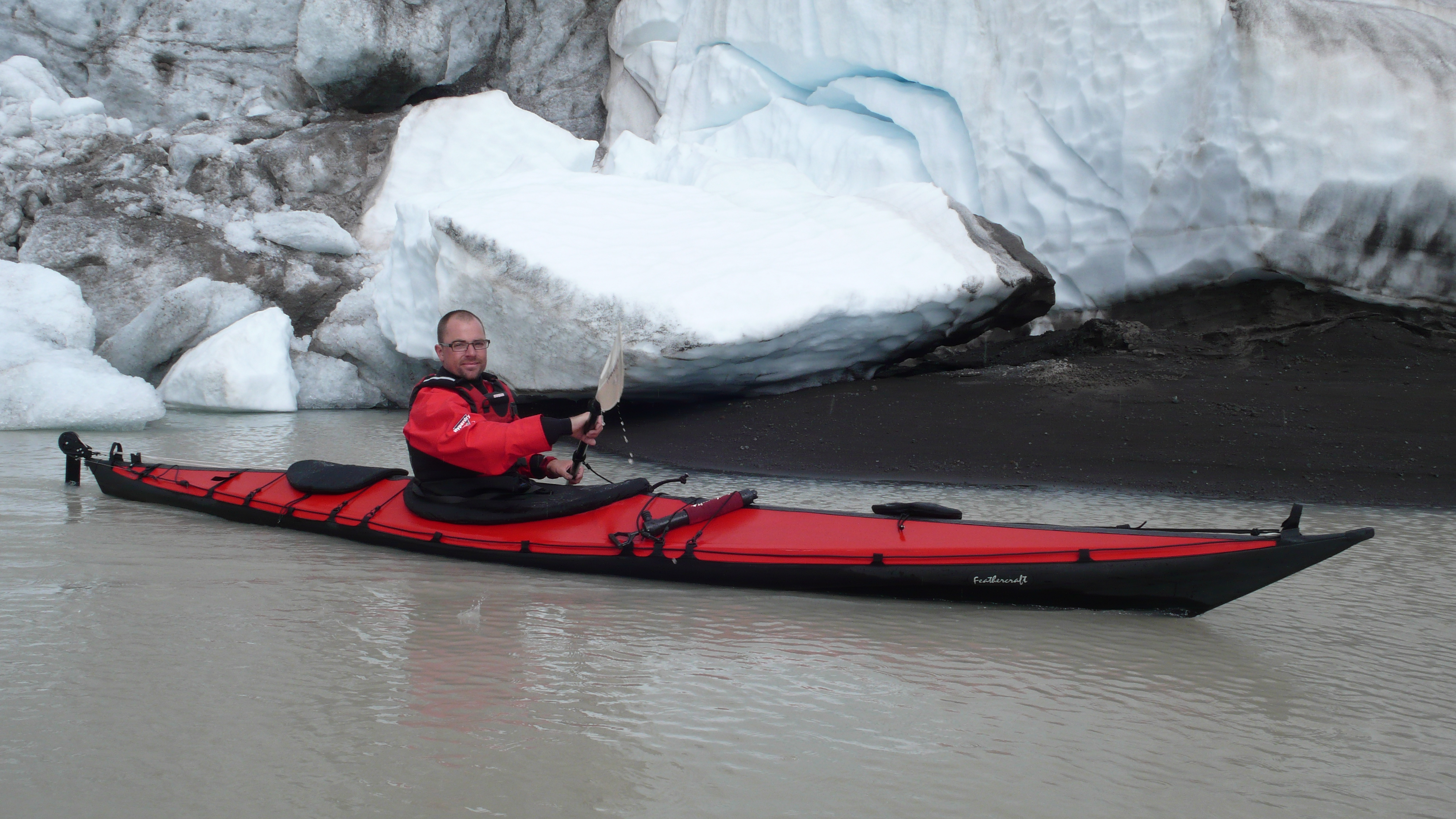 Feathercraft folding Kayak K1 Expedition